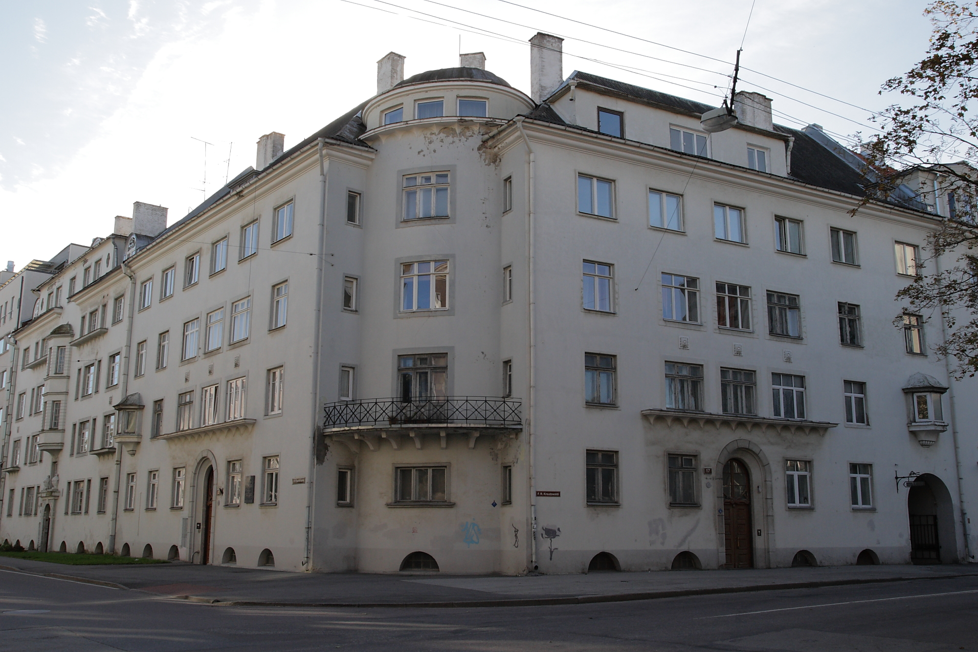 Tallinn, elamu F.R.Faehlmanni 2, 1925, 1932